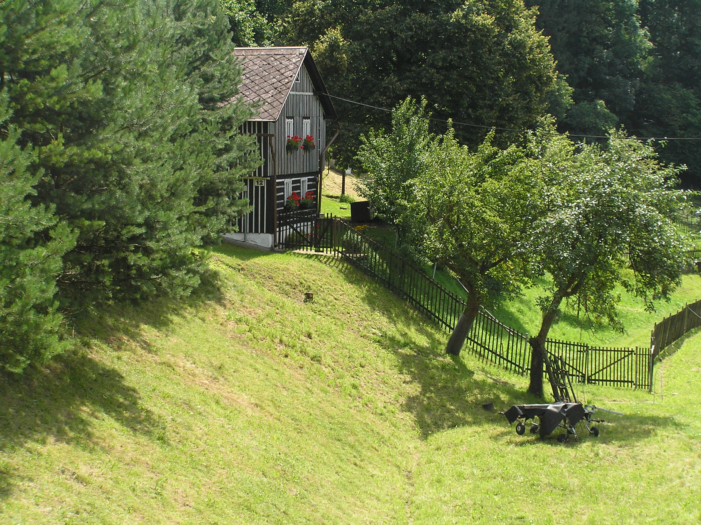 Kaškovice - chalupa čp. 12